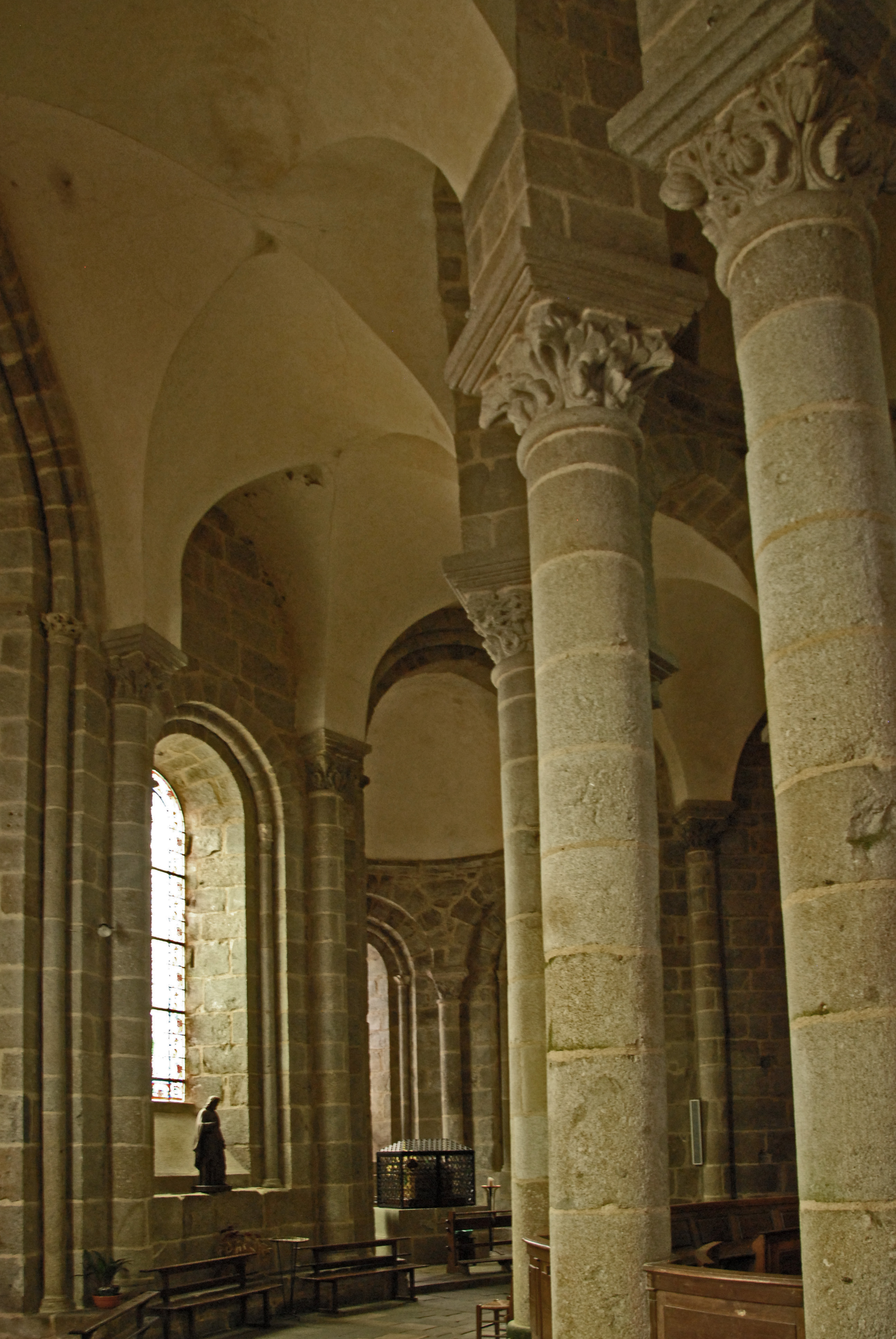 St-Pierre de Le Dorat, Ambulatorium